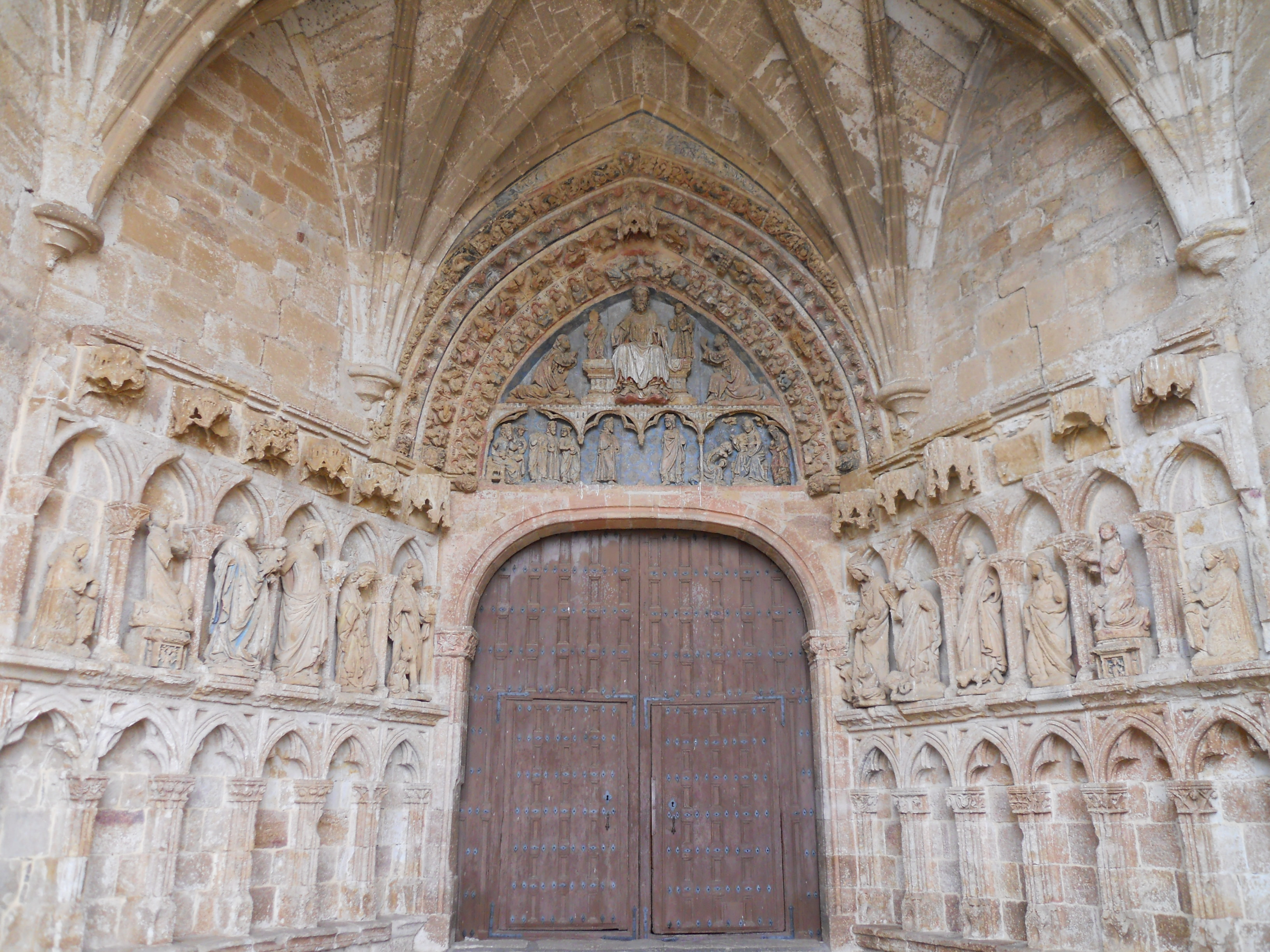 Portada meridional de la iglesia de Santa María la Real de La Hiniesta.